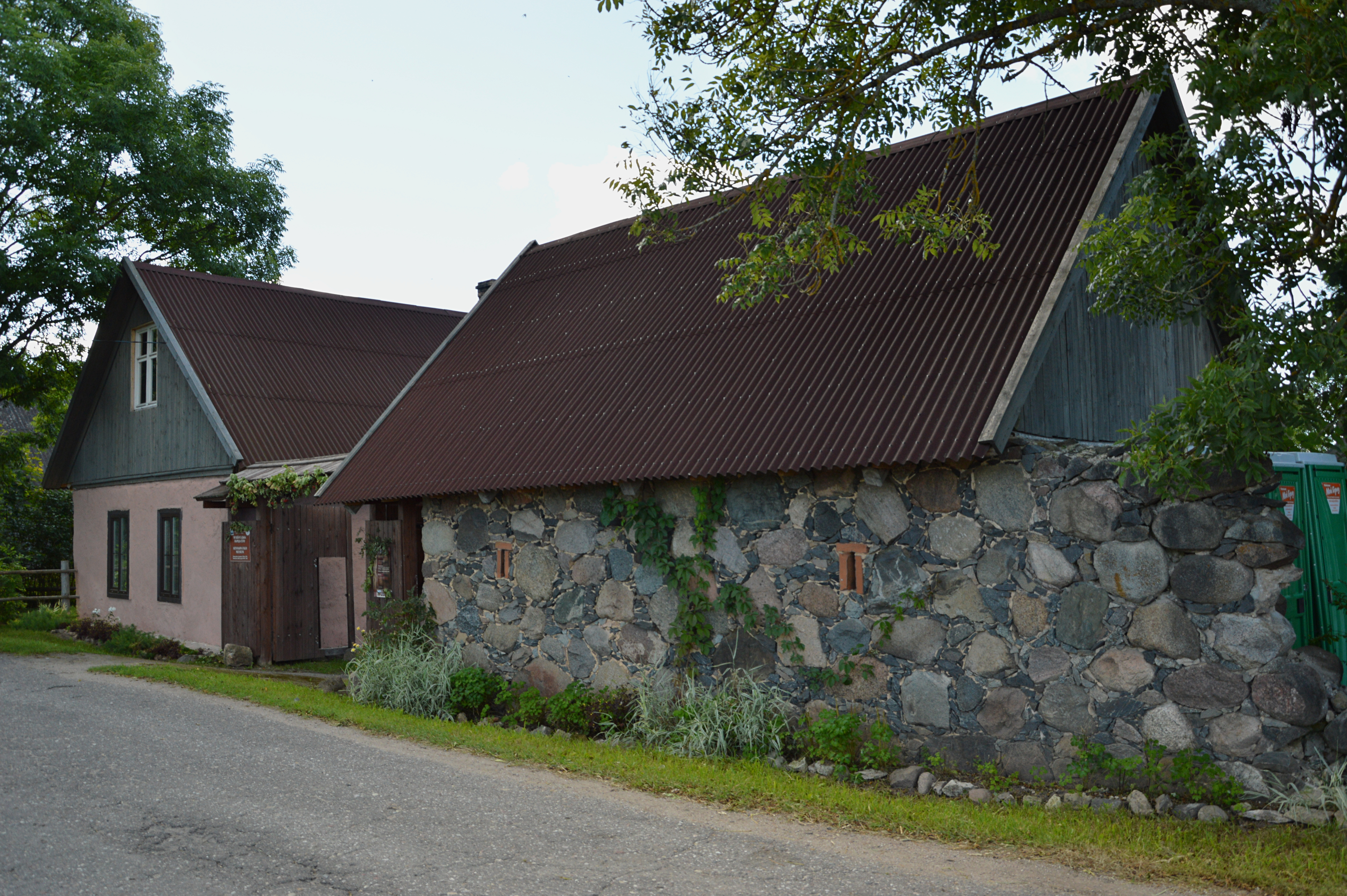 Radaja Seto Muuseum